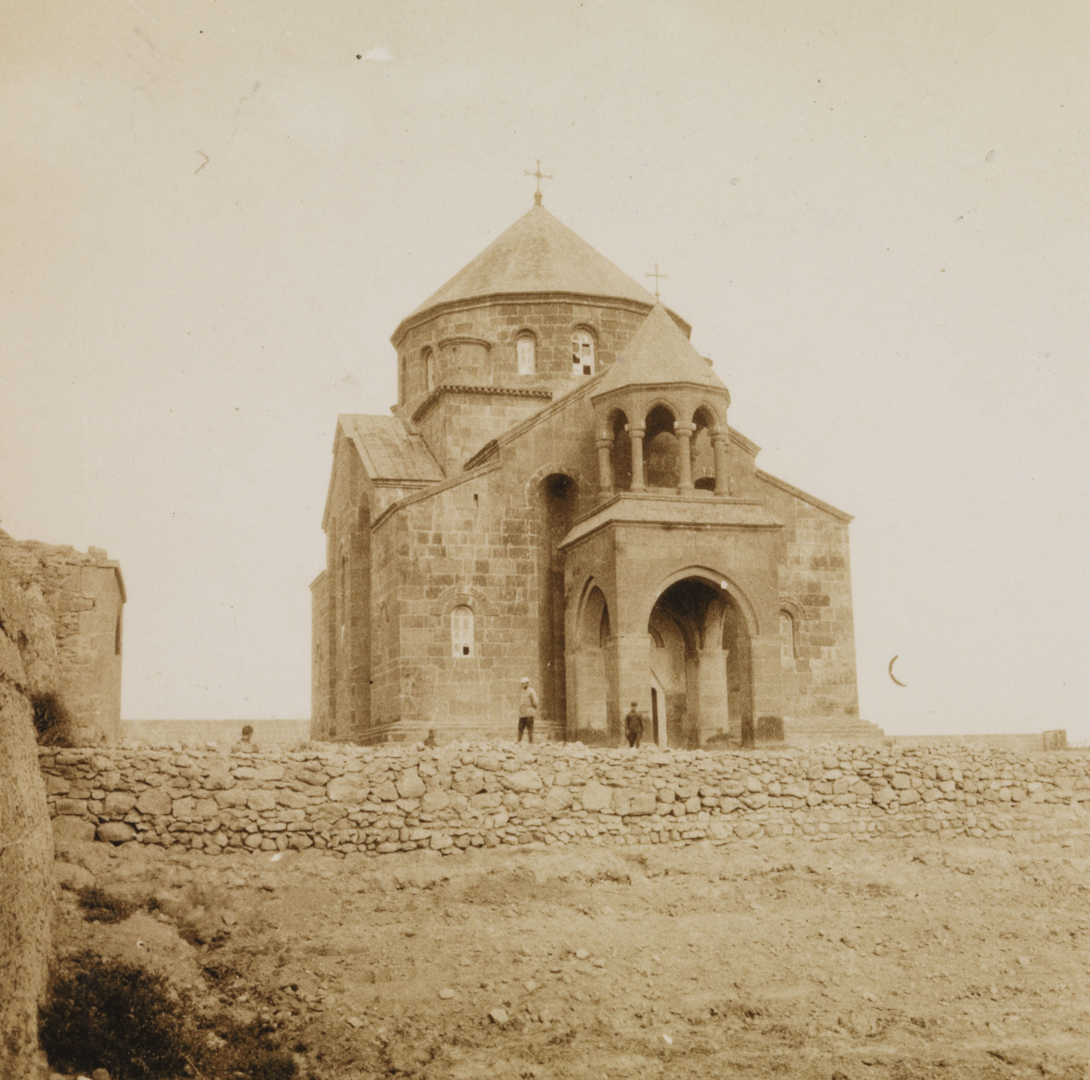 Hripsimekirken ved Etsjmiadzin. Ett av bildene fra reisen gjennom Armenia i perioden 7 juni til 2 juli 1925. På anmodning fra Det Internasjonale Arbeidsbyrå (ILO) og Folkeforbundet reiste Fridtjof Nansen sammen med en utpekt kommisjon sakkyndige for å besøke landet og undersøke planer for kunstig vanning av ørkenområder med tanke på å overføre armenske flyktninger dit. Depicted place: Armenia, Etsjmiadzin